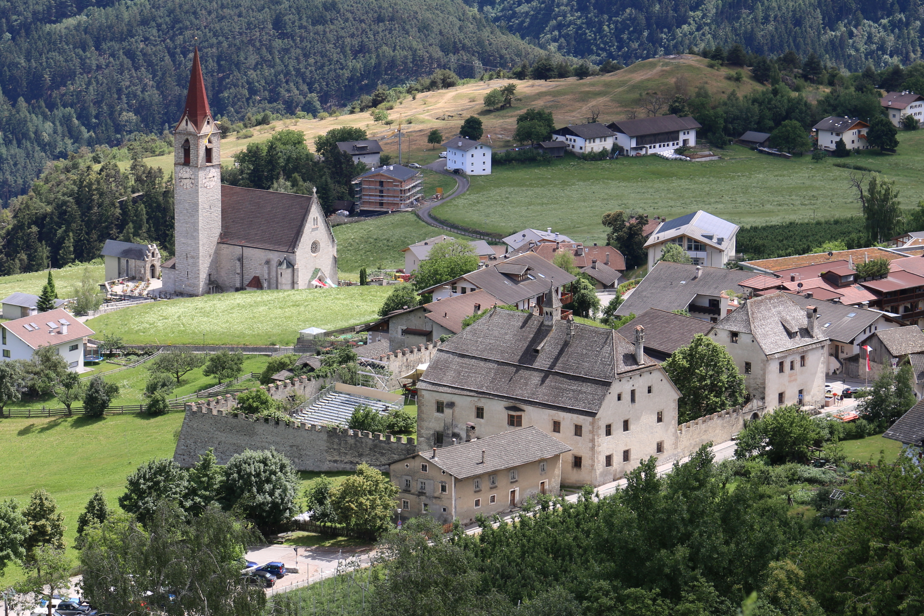 Feldthurns in Südtirol: gut erkennbar das Schloss Velthurns, das ehemalige Wirtschaftsgebäude des Schlosses (Zimmerer) und die Pfarrkirche Mariä Himmelfahrt